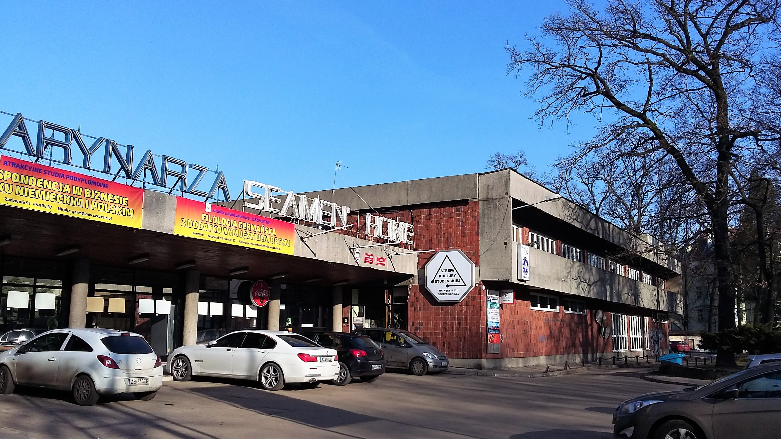 Budynek Instytutu Filologii Germańskiej Uniwersytetu Szczecińskiego